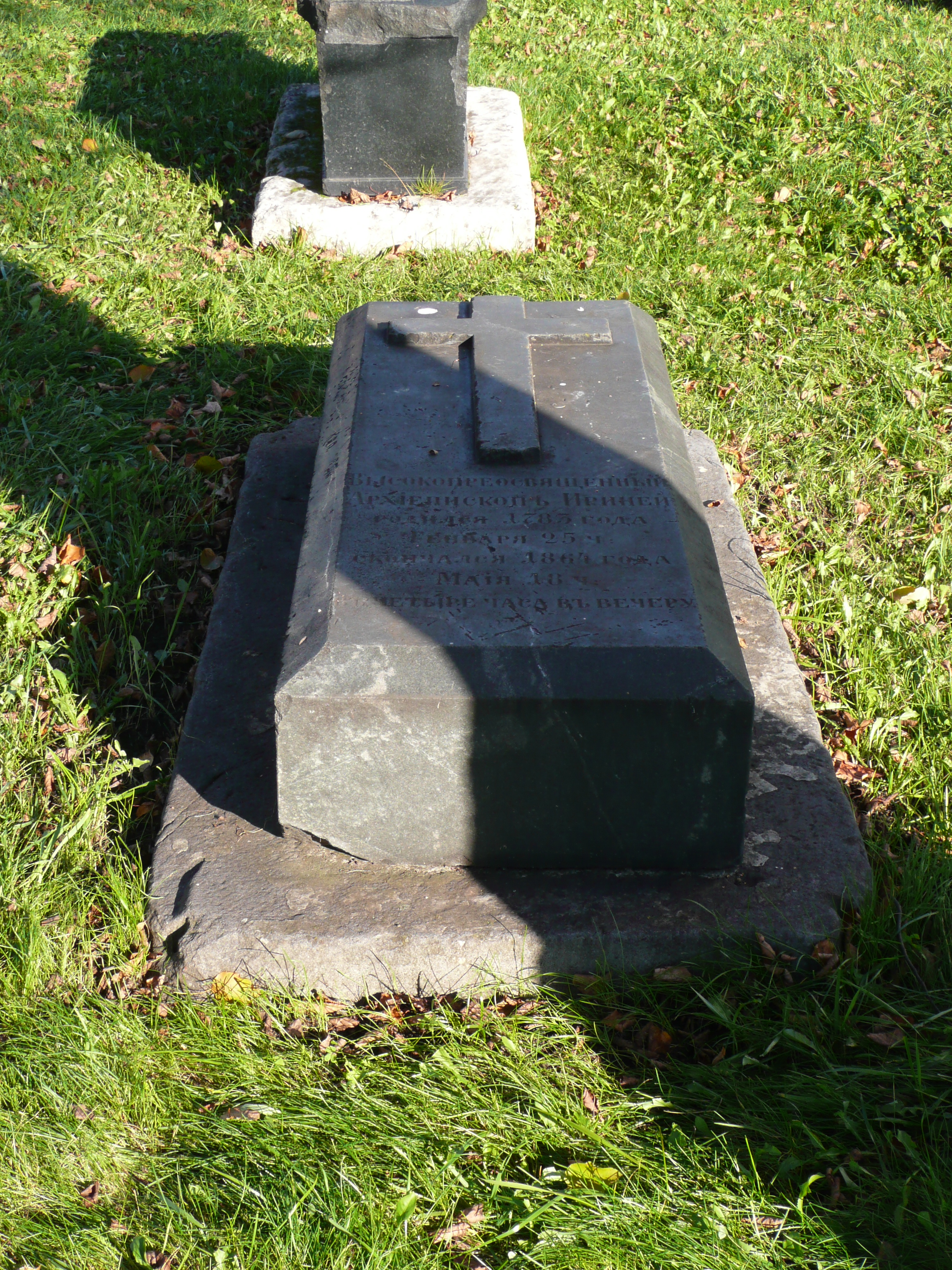 Могила иркутского архиепископа Иринея (1783-1864) в Толгском монастыре